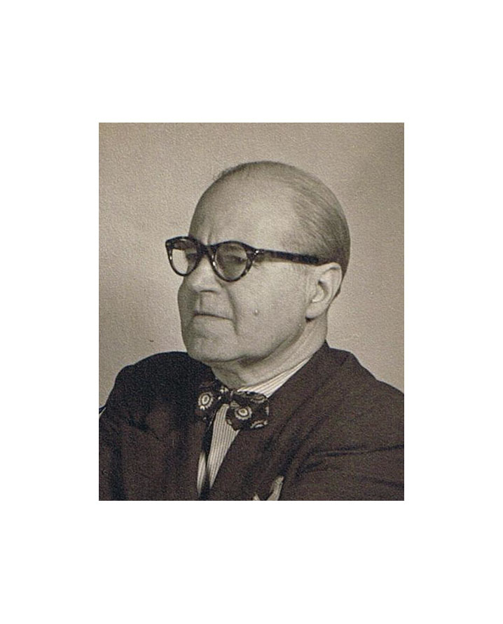 René Plaissetty peu avant sa mort